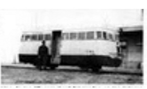 Autovía primitivo de madera contribuidor en los talleres de km 5. Fueron llamados cucarachas por su incomodidad.